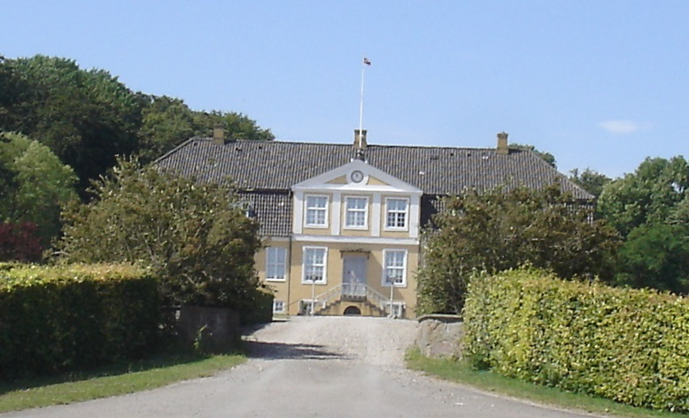 Engelholm. Skåret fra større billede